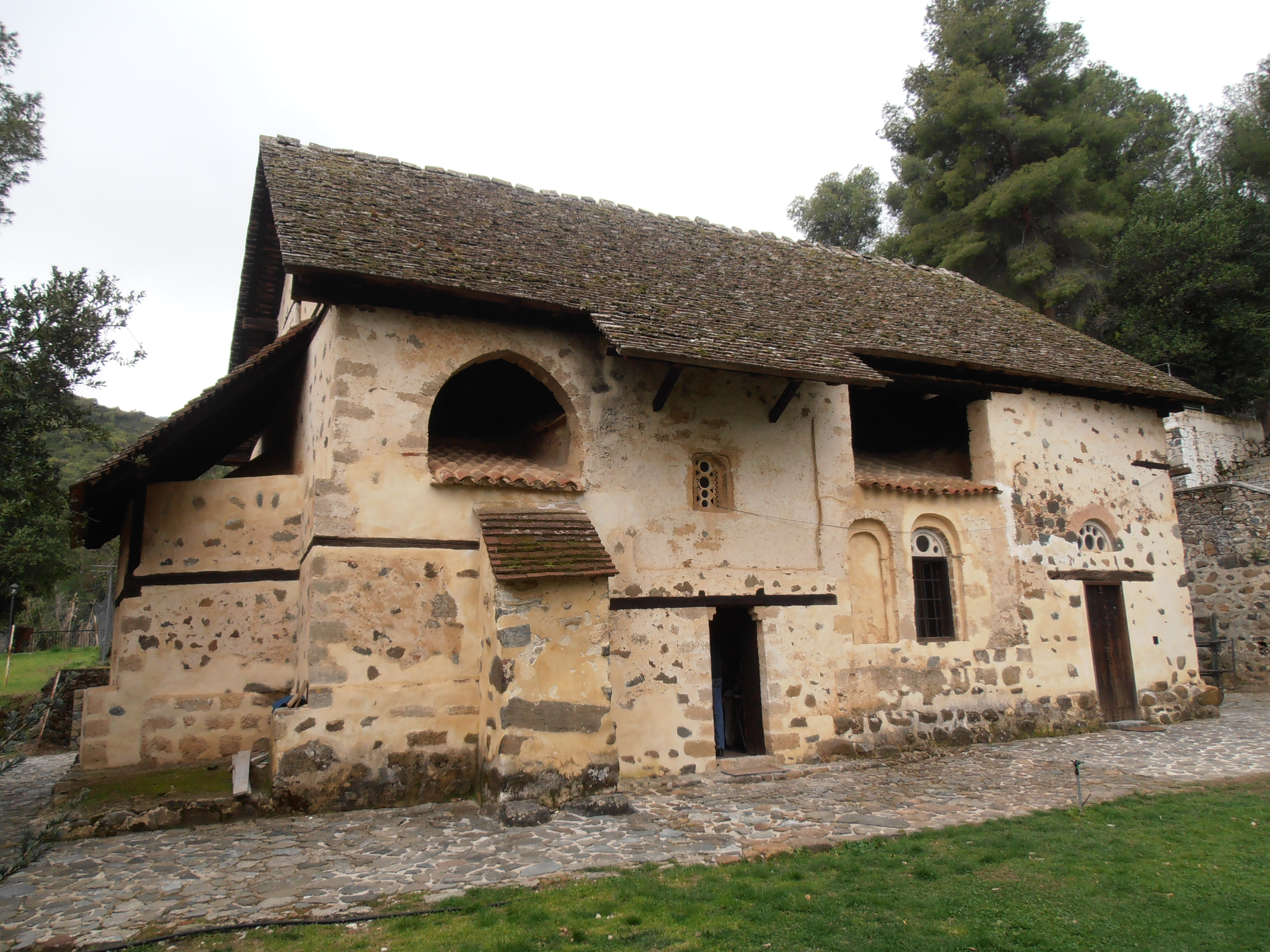 Photo der Kirche Agios Nikolaos tis Stegis